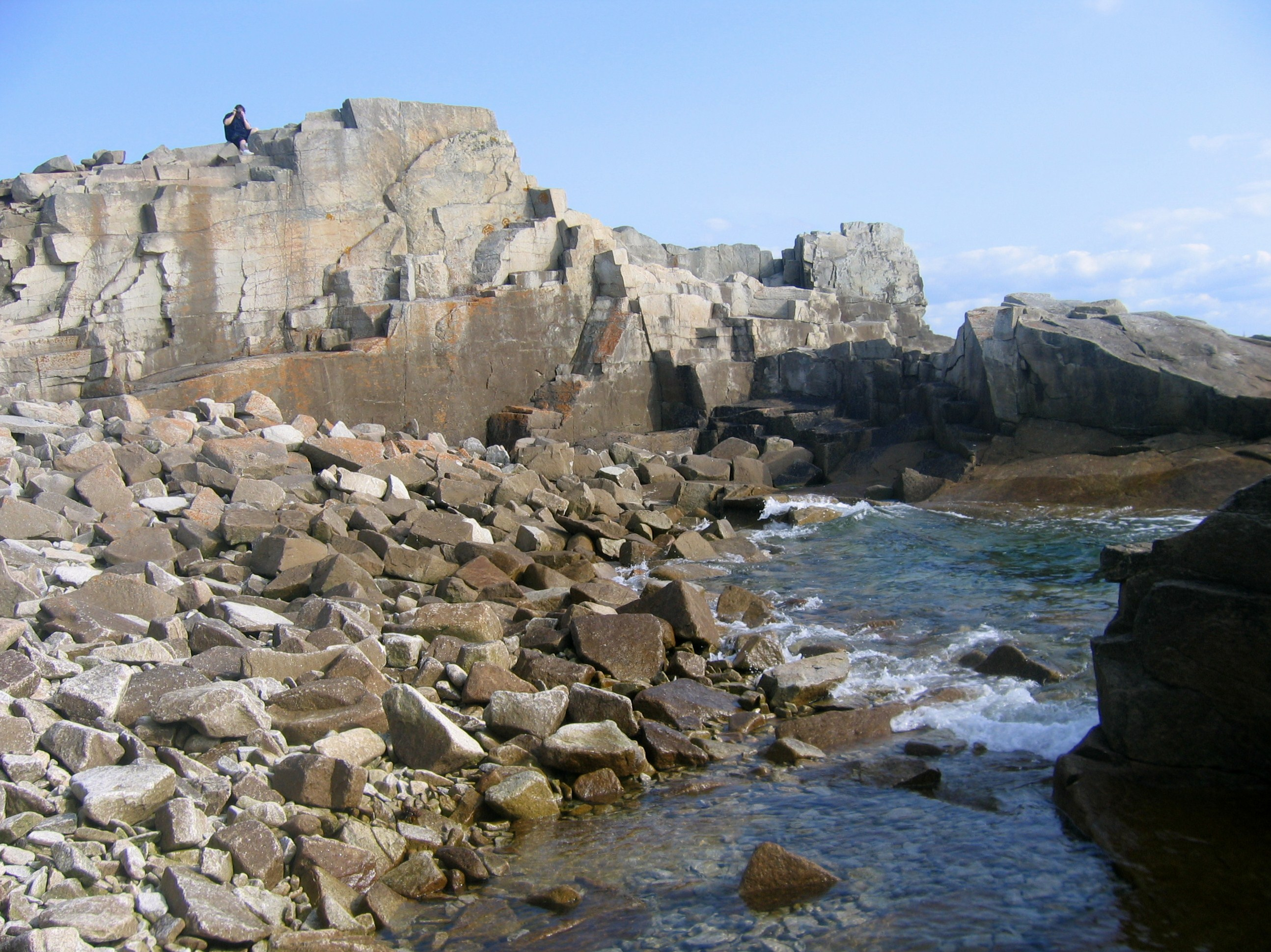 L' Ile grande, les anciennes carrières Côtes d'Armor Région_Bretagne